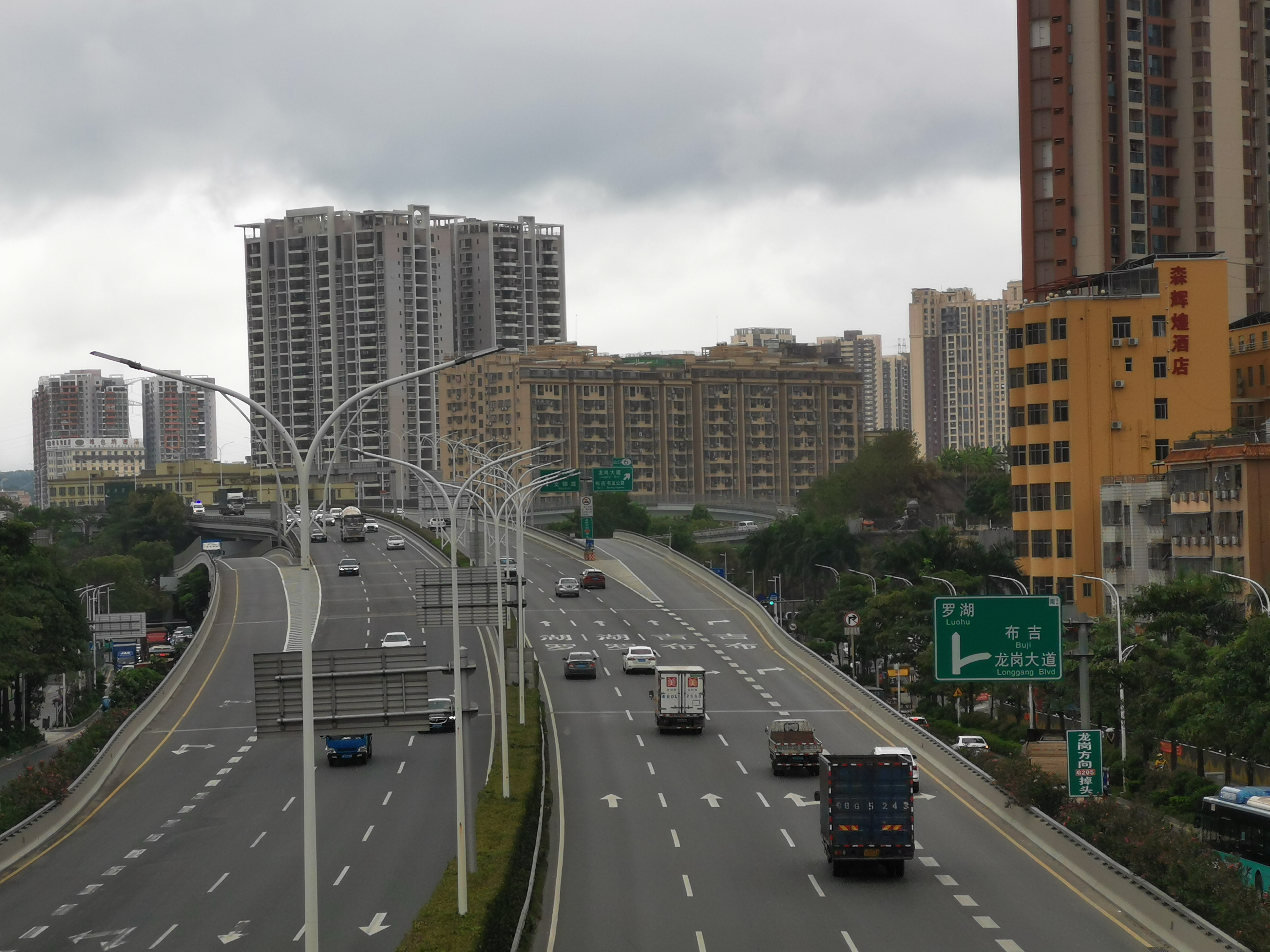 深圳丹平快速路丹竹头段